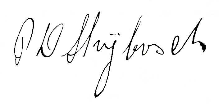 Piet Strijbosch signature.